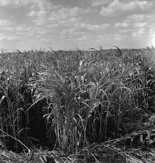 שדה קמה בבית יוסף